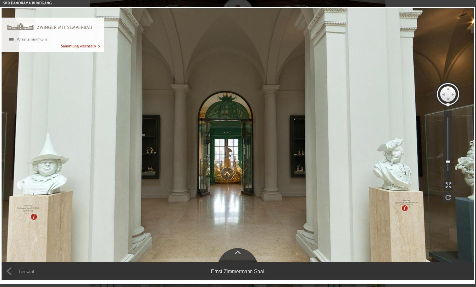 Screenshoot virtueller Rundgang SKD Porzellansammlung Zwinger Dresden - Ernst-Zimmermann-Saal